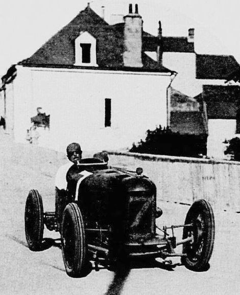 Albert Divo, deuxième du Grand Prix de l'ACF 1923, sur Sunbeam.